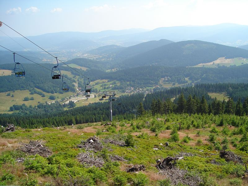 Góry Bialskie, wieś Sienna i Masyw Śnieżnika widziane z kolei linowej na Czarną Górę.